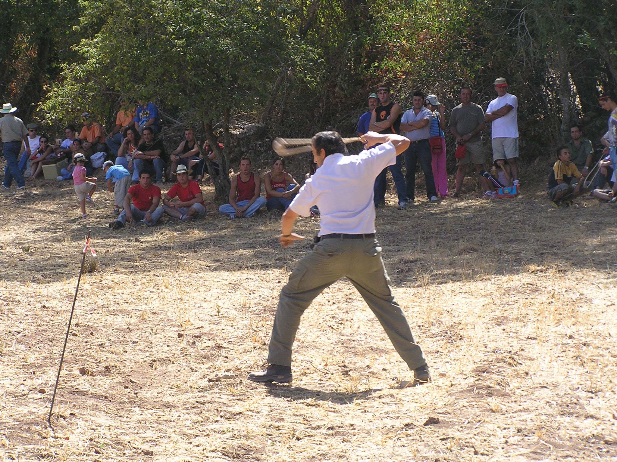 Competición de tiro con honda, en Charilla ,aldea de Alcalá la Real,Jaén,España